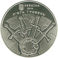 500-річчя битви під Оршею аверс